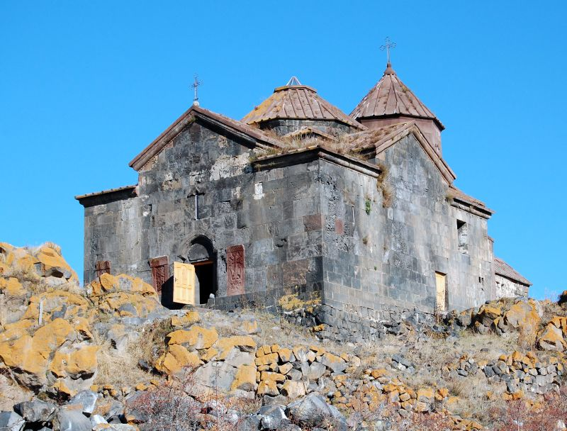 Hayravank from SW - Gegharkunik, Armenia.